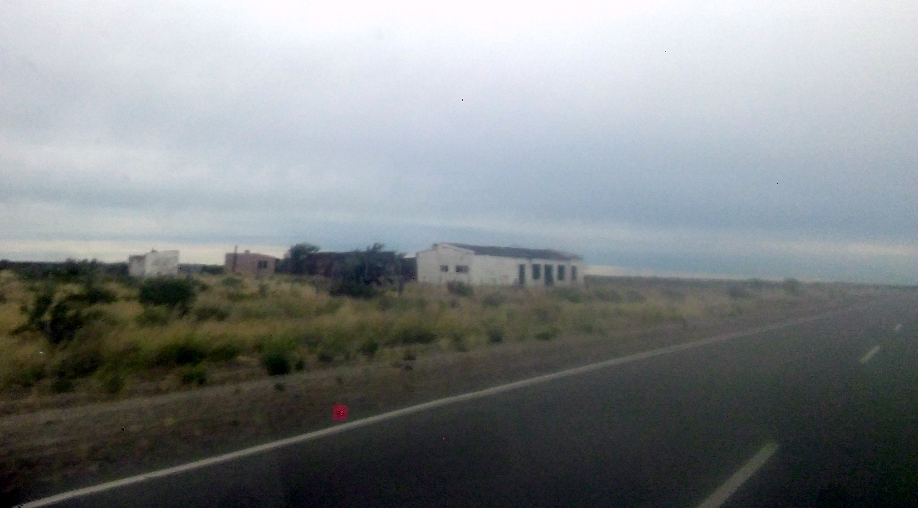 Restos del apeadero, hoy hay un casco de estancia en ese lugar.